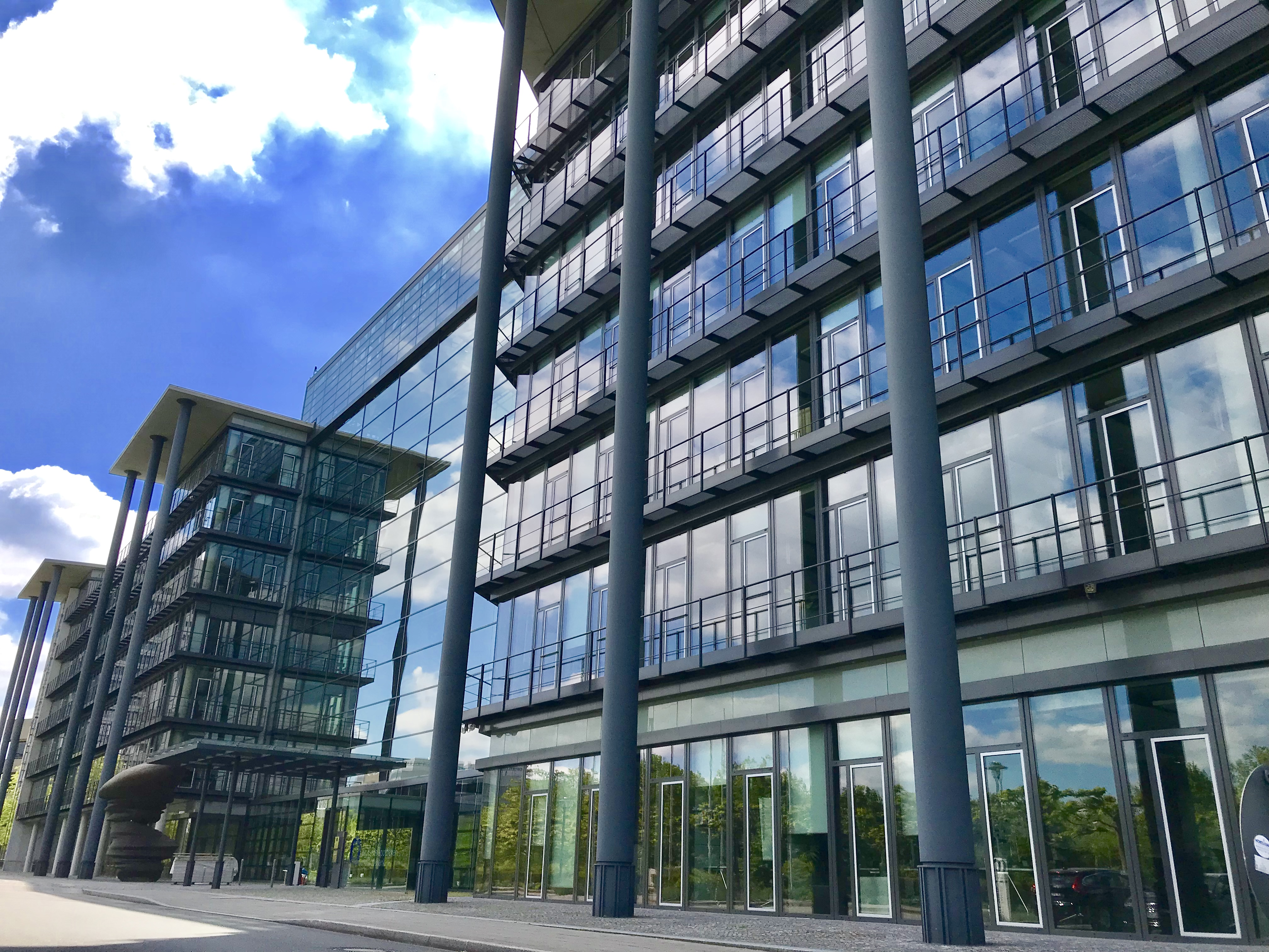 Hauptverwaltung Apobank